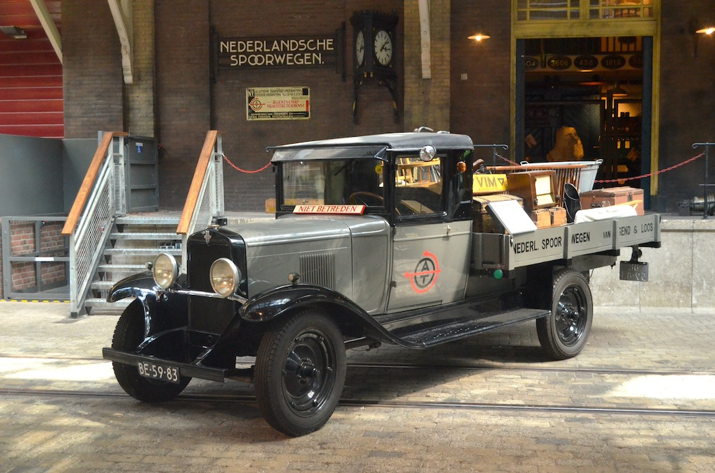 Nederlands Spoorwegmuseum Van Gend & Loos Chevy vrachtauto. Foto: Erik Swierstra.